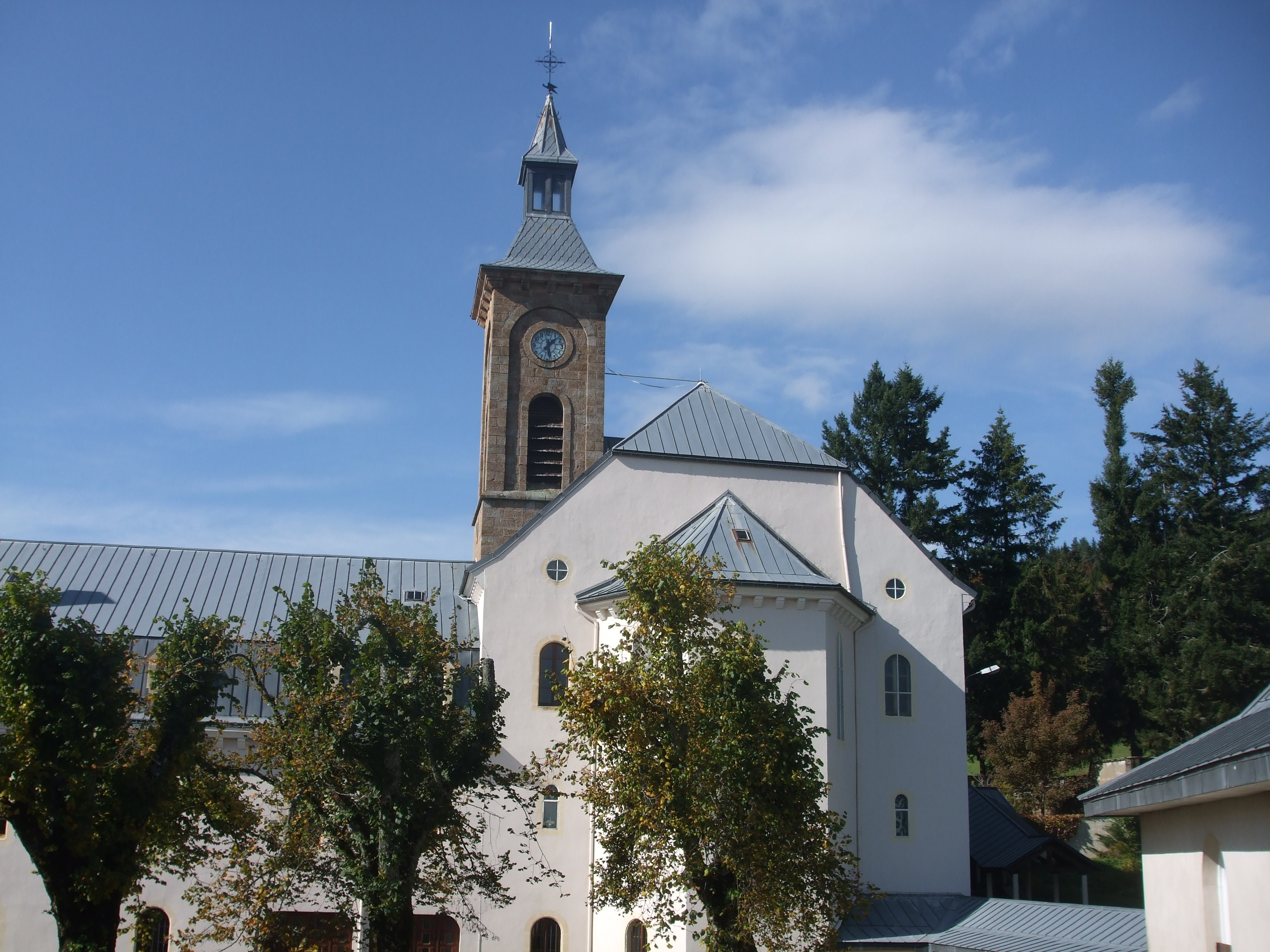 église abbatiale de Notre Dame des Neiges (Saint Laurent les Bains)